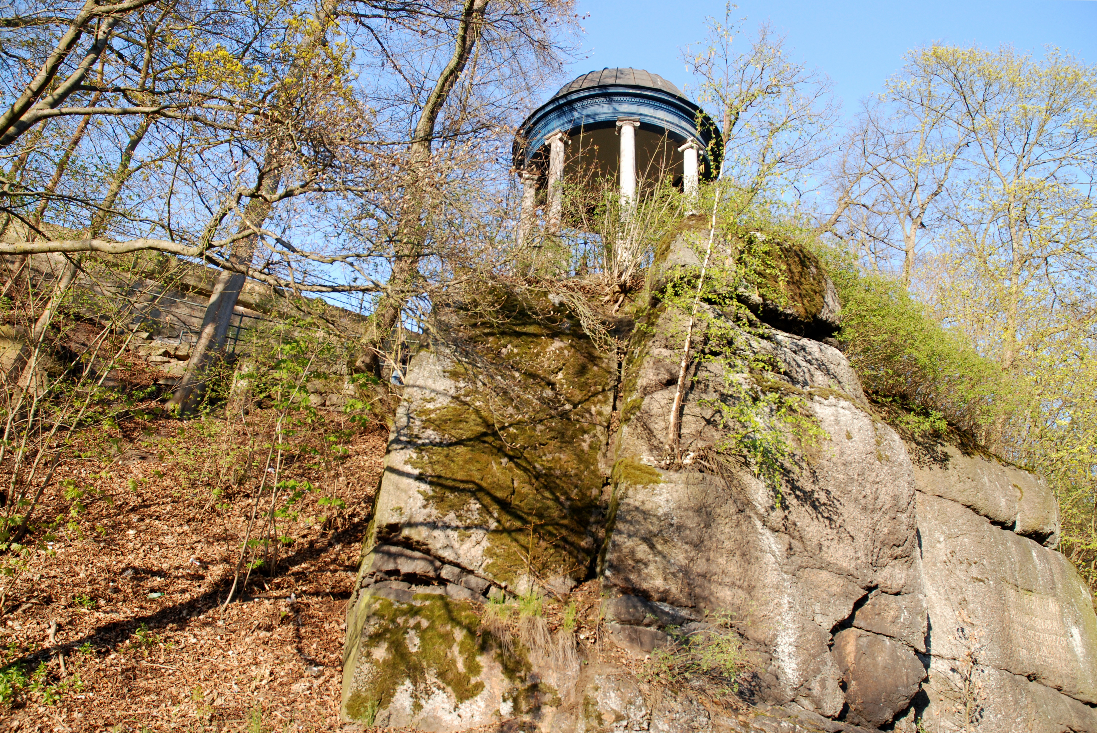 Dorotin altán nad řekou Teplou proti Galerii umění v Karlových Varech